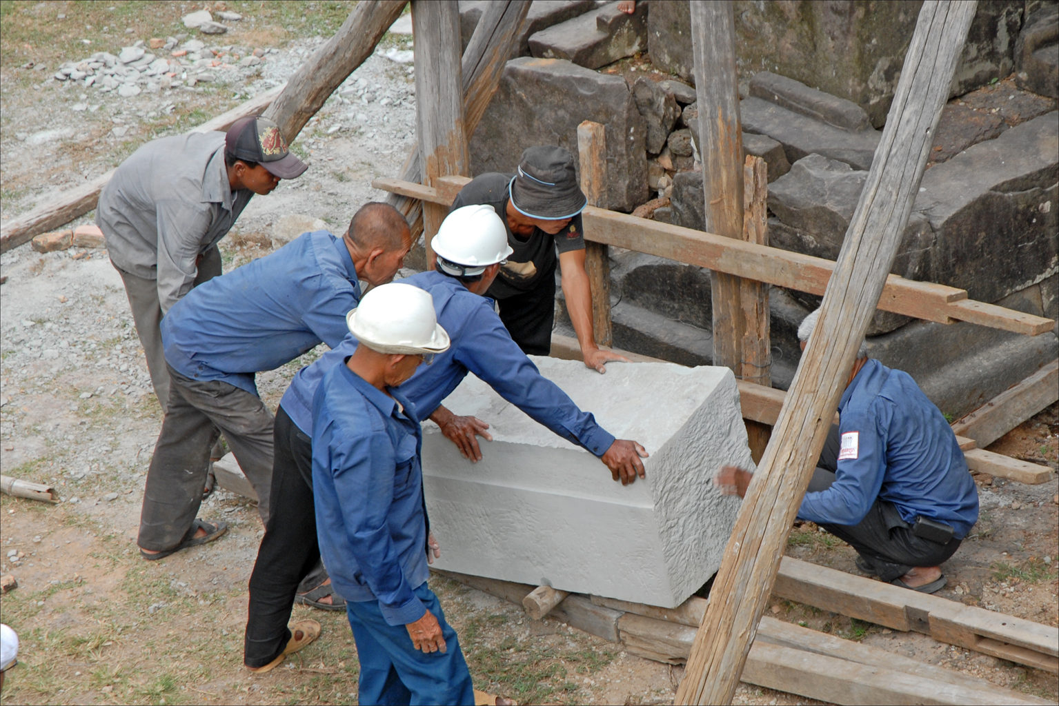 Travaux de restauration du Bakong Les ouvriers cambodgiens transportent les pierres sans matériel de levage, comme le faisaent leurs ancêtres _____________ Le Bakong est le temple-montagne d'Etat du Roi Indravarman 1er (877-889). Il est consacré au culte hindouiste shivaïte et au dieu Indreshvara (représenté sous forme de linga). Il est orienté vers l'est, construit sur une levée de terre de 900 m sur 700 m et comprend cinq gradins formant une pyramide de 14 mètres de hauteur. Les soubassements sont pour la 1ère fois construits en grès et les tours en briques (elles sont postérieures de 2 siècles à la pyramide). Des statues d'éléphants, gardiens des points intermédiaires, sont situées aux angles des 3 premiers étages. Le temple-montagne est entouré de douves remplies d'eau, symbolisant l'océan primordial de la cosmogonie hindouiste. Au sommet, se dresse une tour-sanctuaire représentant le Kailâsa, la demeure du dieu Shiva (construite dans le style d'Angkor et restaurée de 1936 à 1943 par l'archéologue français Maurice Glaize. voir aussi l'album de 2008